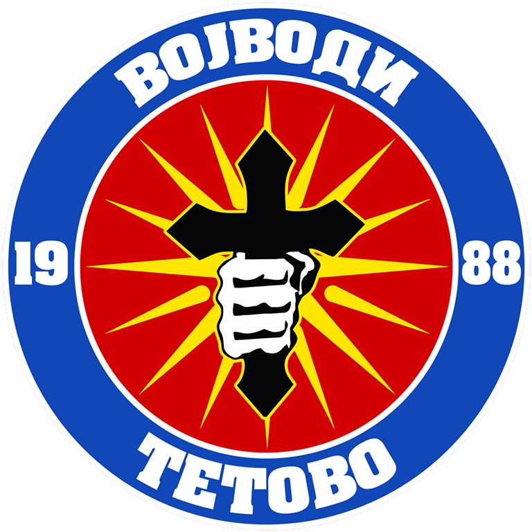 Амблемот на Војводи Тетово